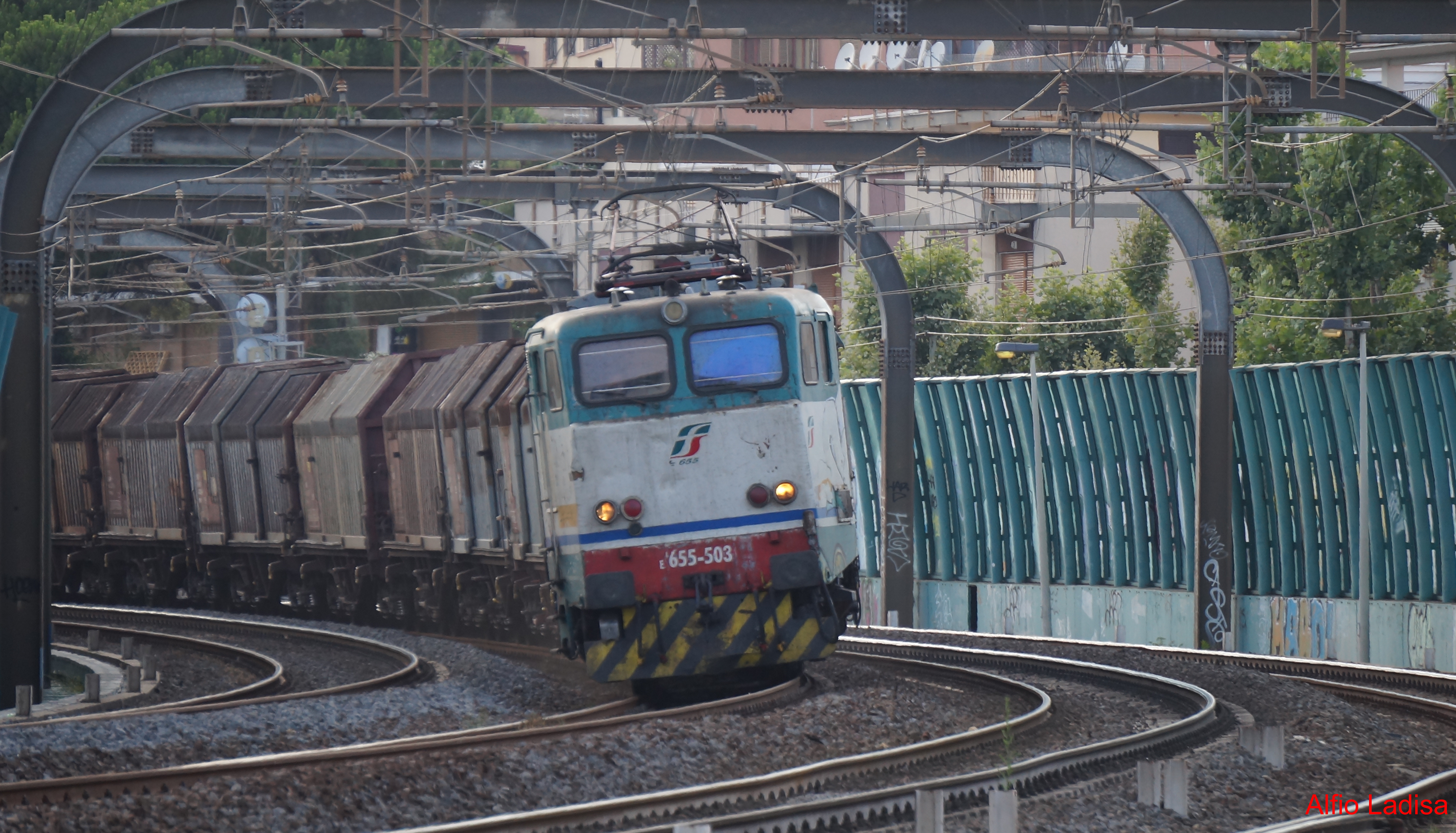 La locomotiva FS E.655.503 traina un treno merci composto da carri di tipo sh telescopici per il trasporto dei coils, proveniente da Fiorentina di Piombino e diretto a Nola Interporto